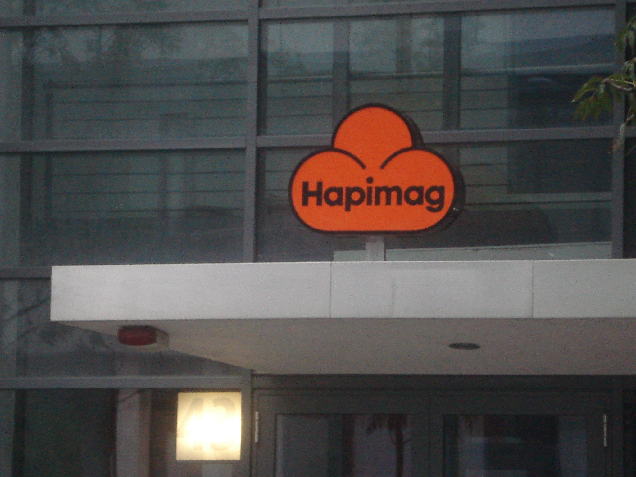 Het teken van de Hapimag-groep